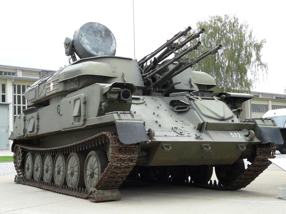 Sowjetische Fliegerabwehr-Selbstfahrlafette ZSU-23-4W1 „Schilka“ der Nationalen Volksarmee der DDR im Militärhistorischen Museum Dresden.